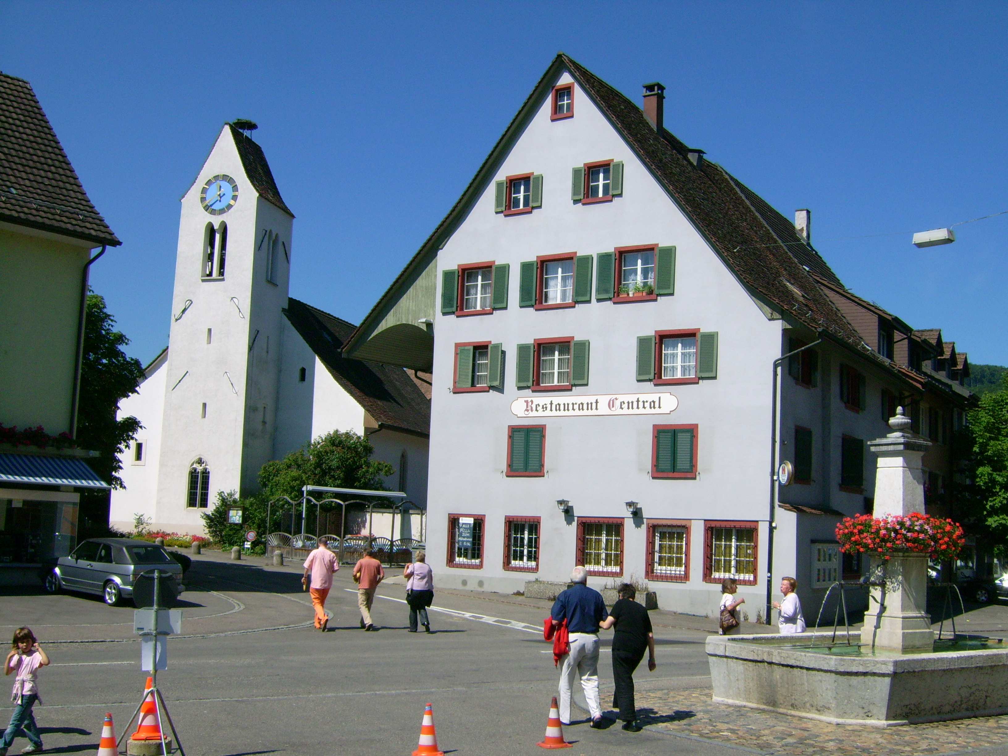 Frenkendorf